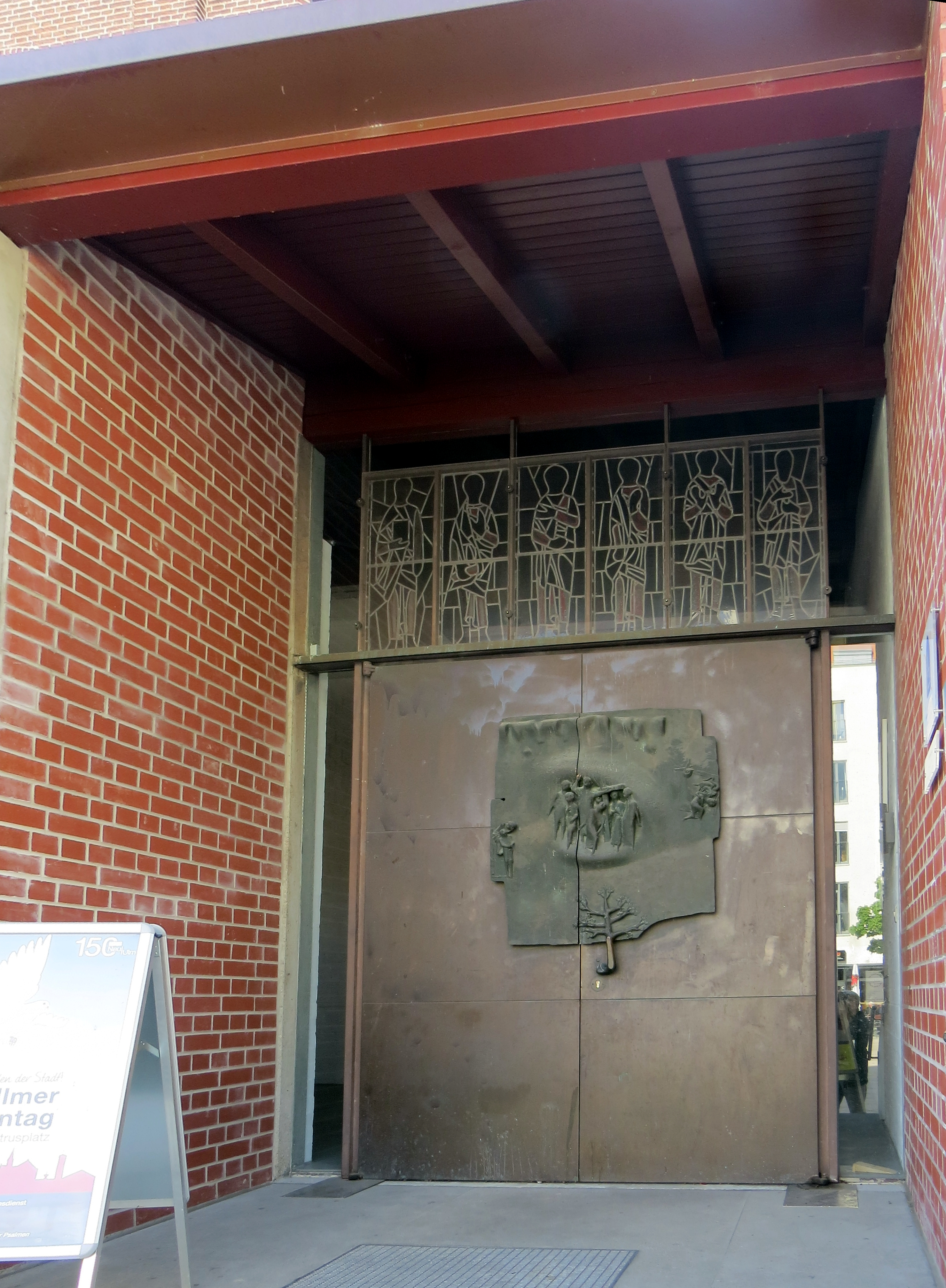 Petruskirche Neu-Ulm, Hauptportal